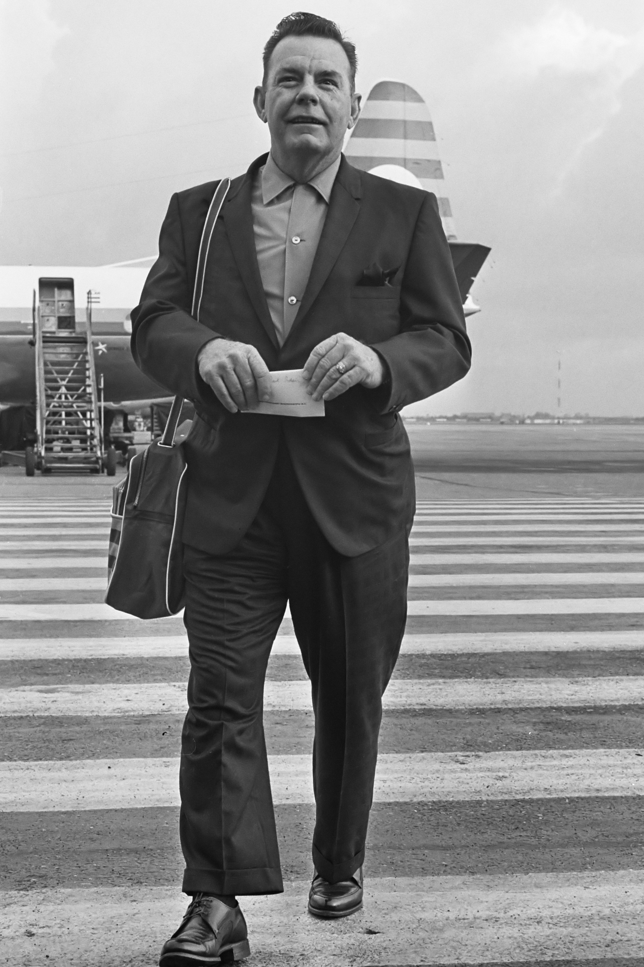 Aankomst Red Adair (the famous firefighter) op Schiphol 9 juli 1964